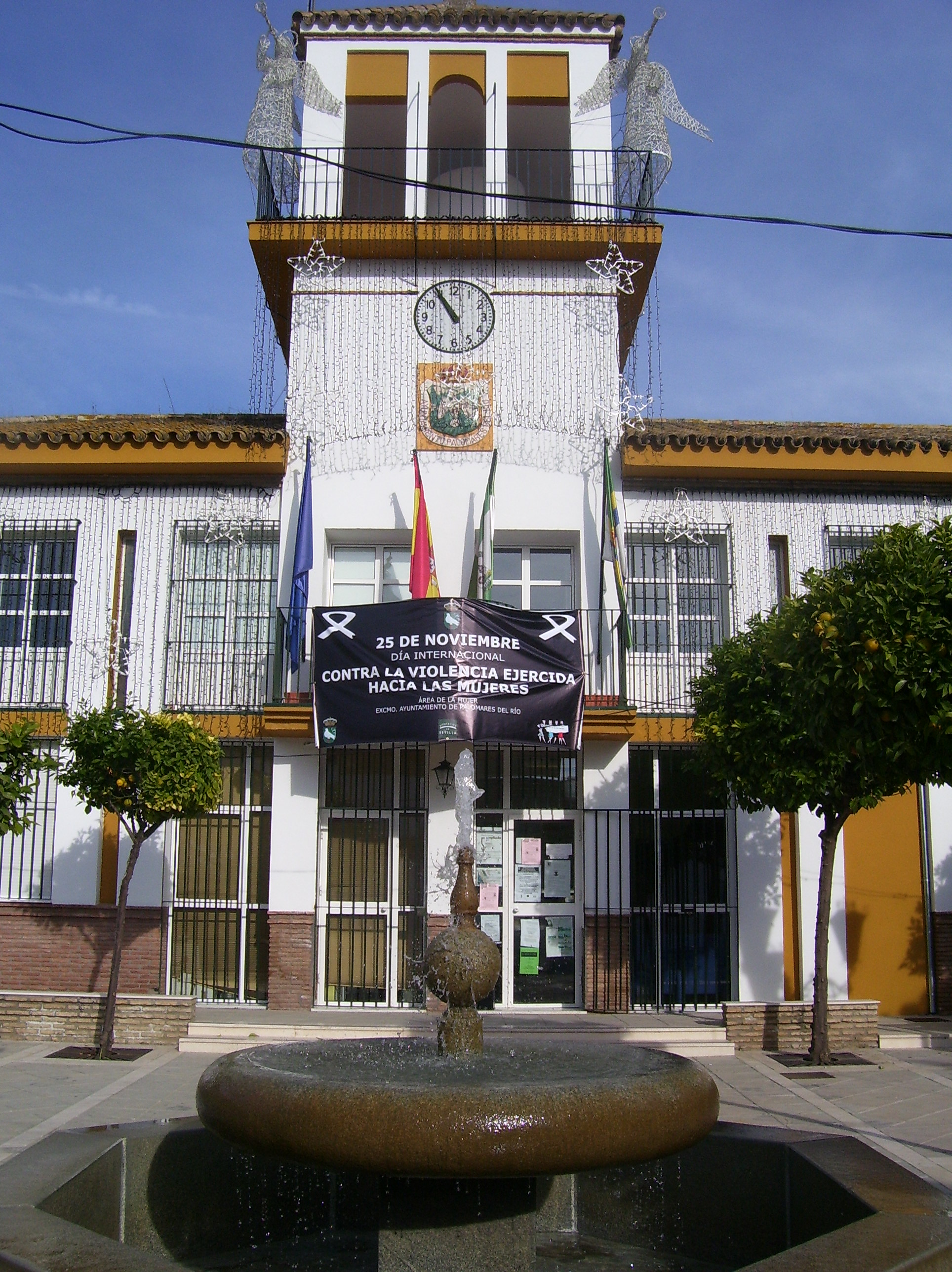 Ayuntamiento de Palomares del Río, en Sevilla, España.